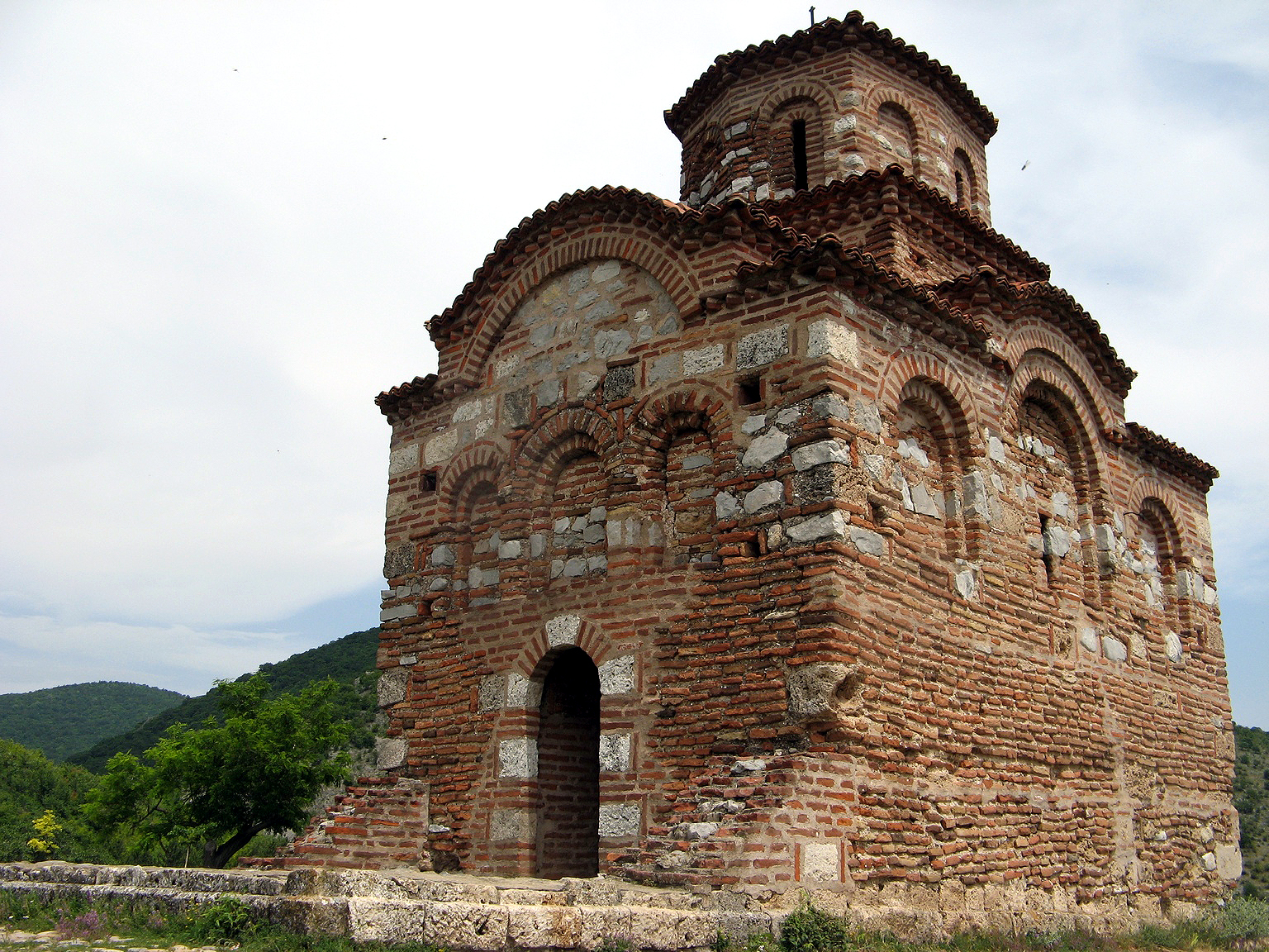 Latinska Crkva, Matejevac, Niš